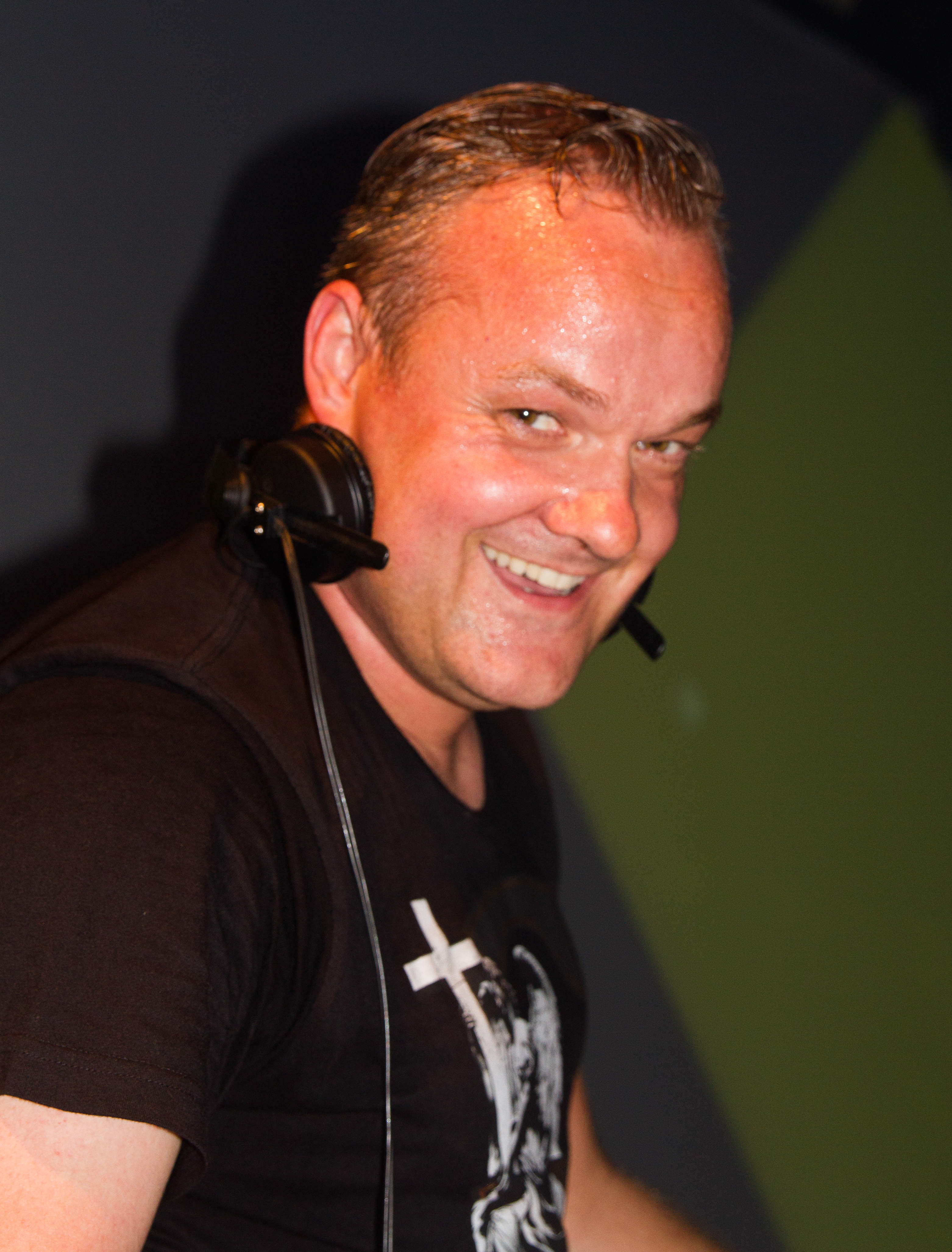 Jay Flog (Jürgen Frosch) beim 14. Airbeat-One Dance Festivals das vom 16. bis 19. Juli 2015 auf dem Flugplatz Neustadt-Glewe.